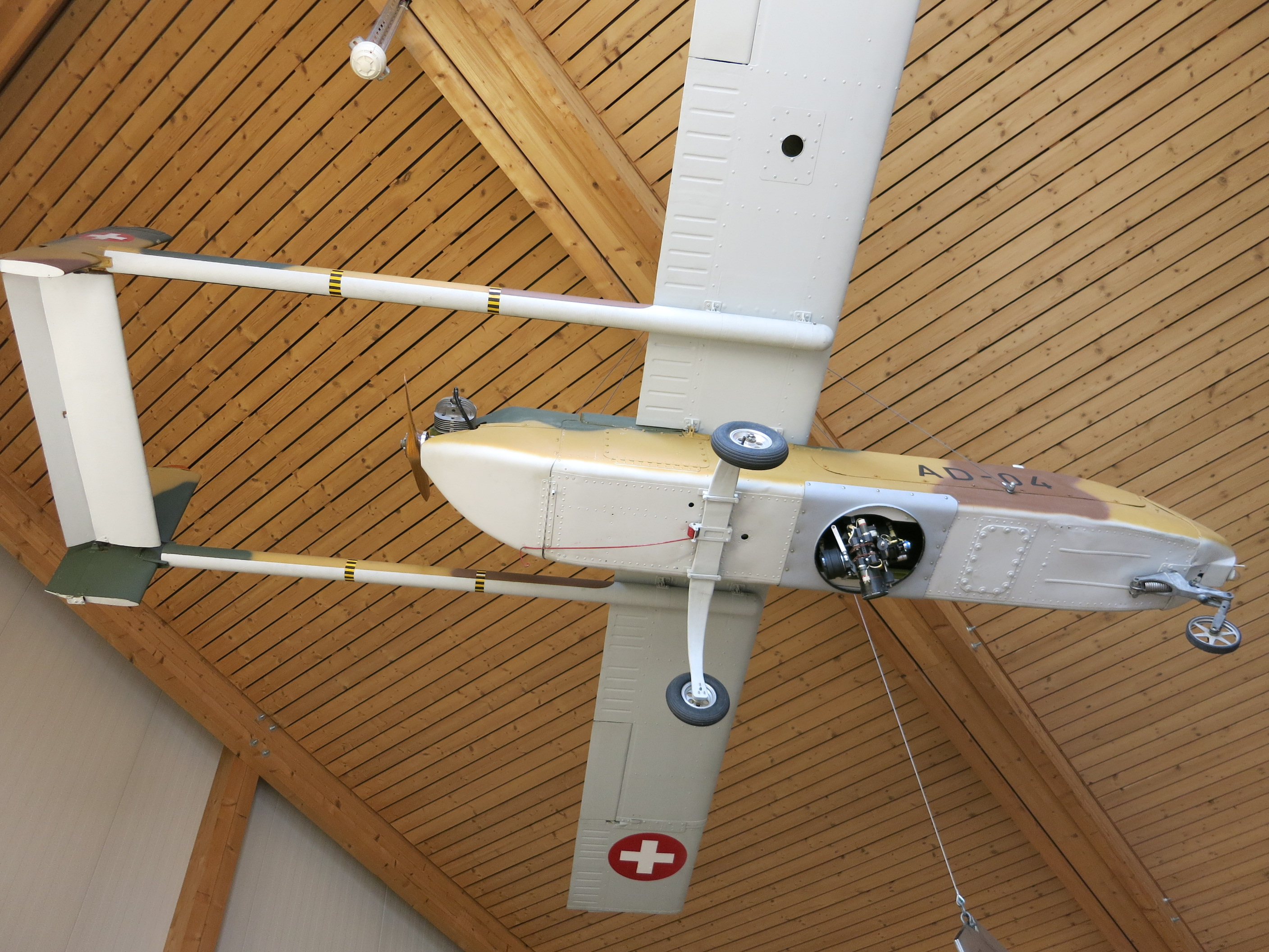 Flieger-Flab-Museum, Dübendorf ZH, Schweiz